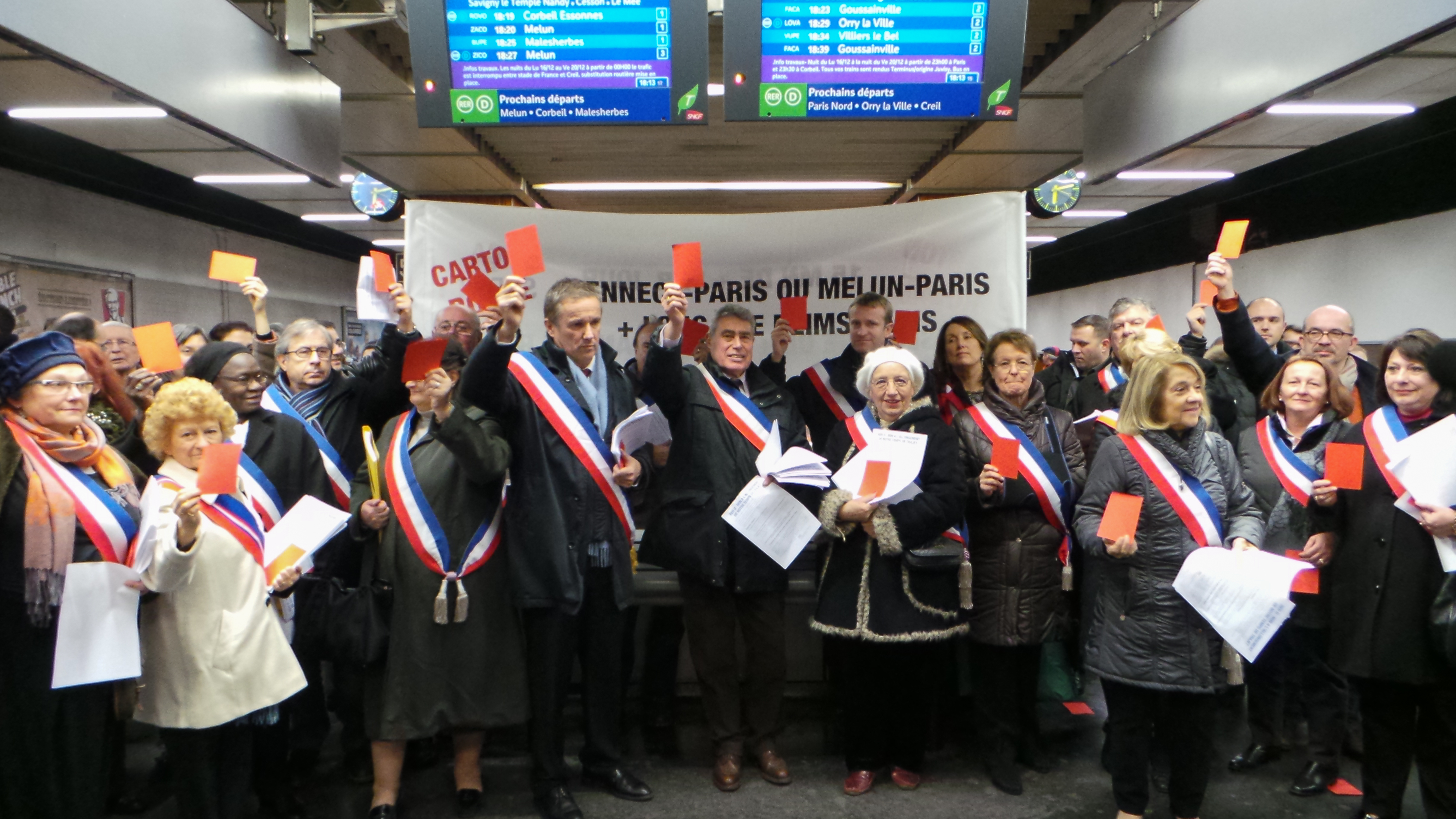 Manifestation d'élus des départements de l'Essonne et de la Seine-et-Marne contre la nouvelle desserte du RER D, le 17 décembre 2013 dans la gare souterraine de Paris-Gare-de-Lyon (quai voies 1 et 3/) /